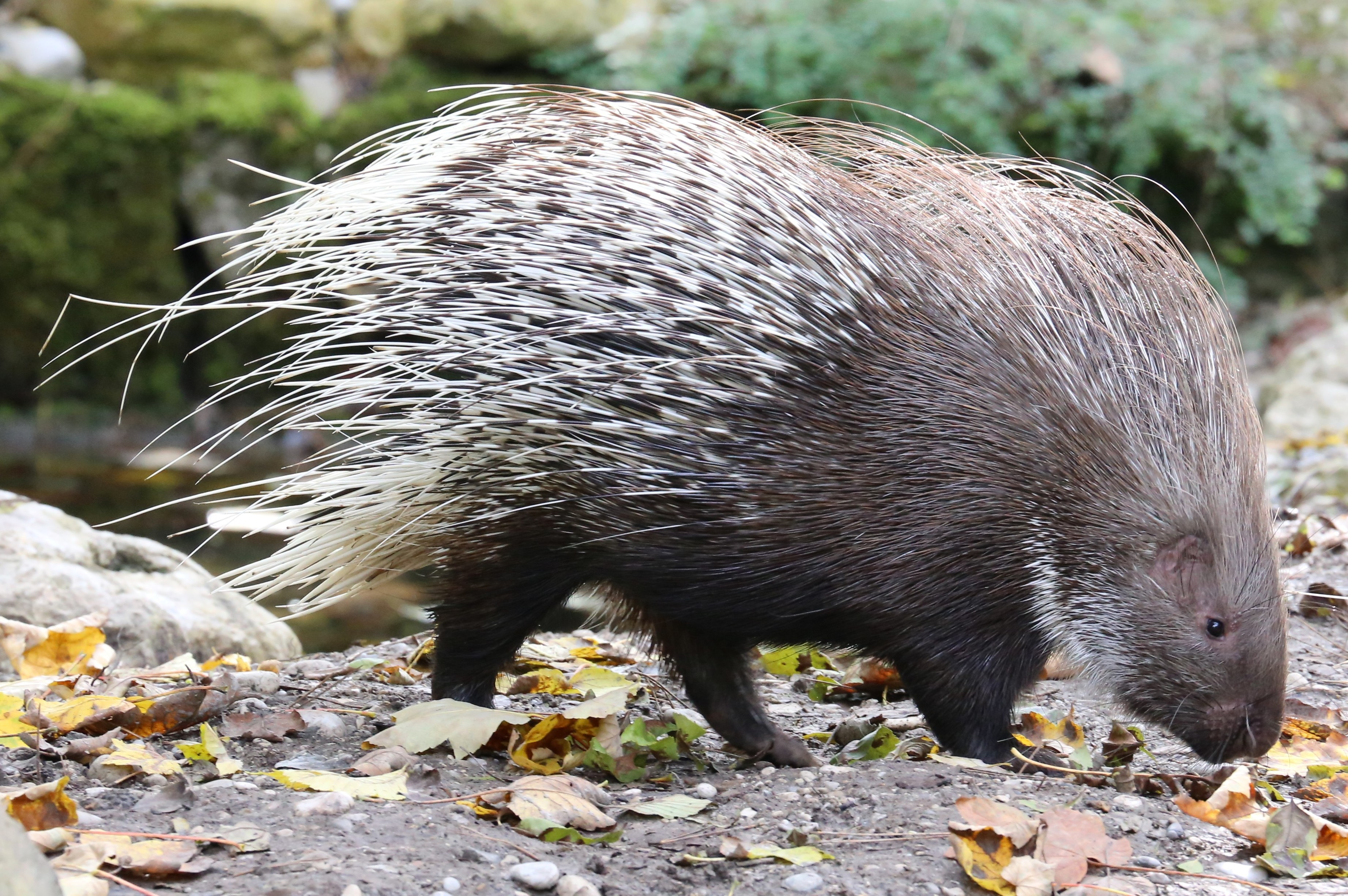 Weißschwanzstachelschwein (Hystrix indica), Tierpark Hellabrunn, München